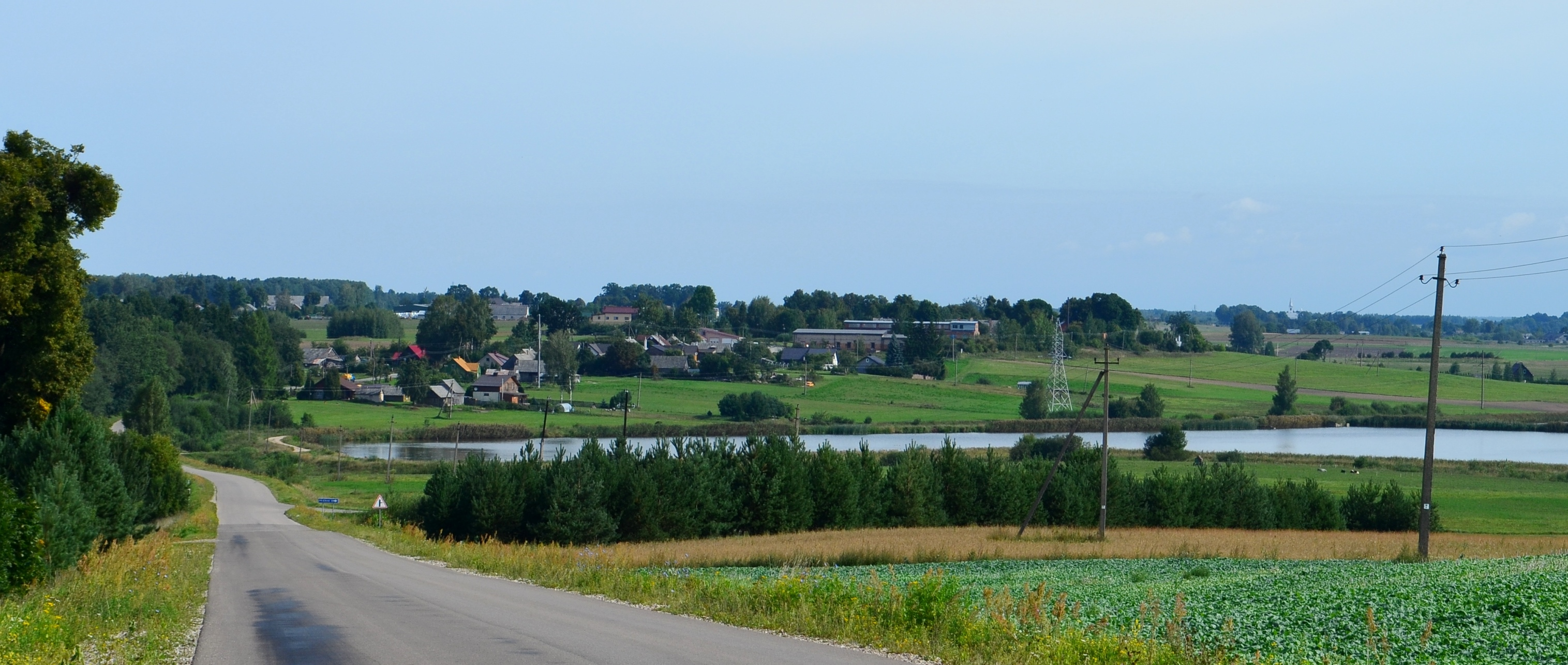 Dambrava, Prienų raj.